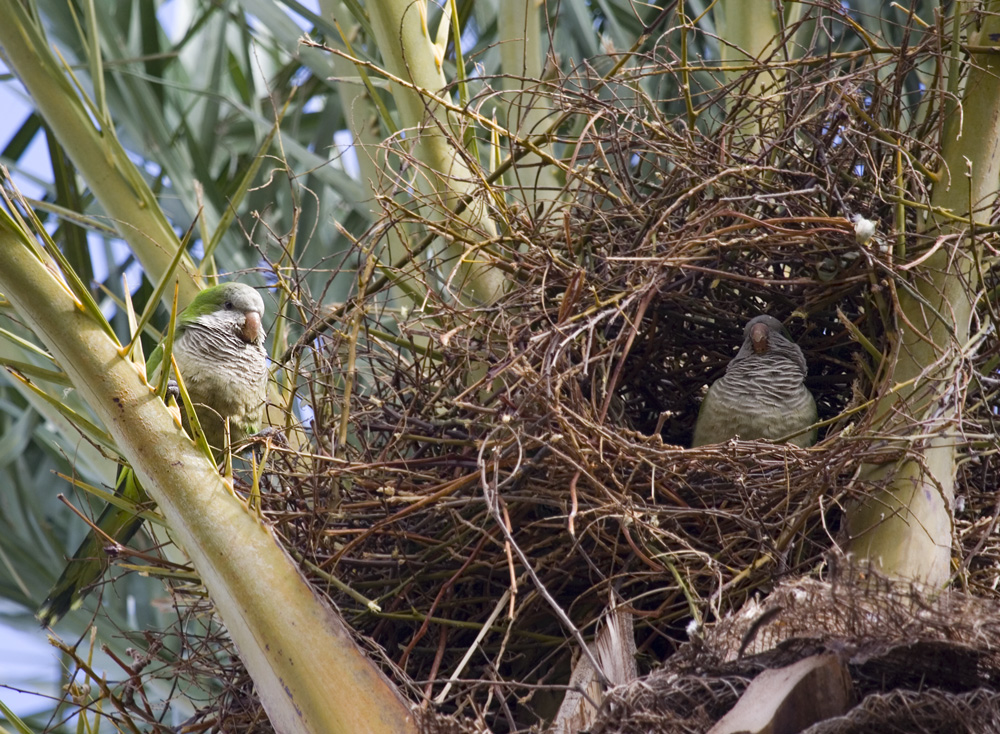 Mönchssittiche (Myiopsitta monachus) im Botanischen Garten in Cadiz, Spain, auf einer Palme brütend. Aufgenommen im Februar 2008.